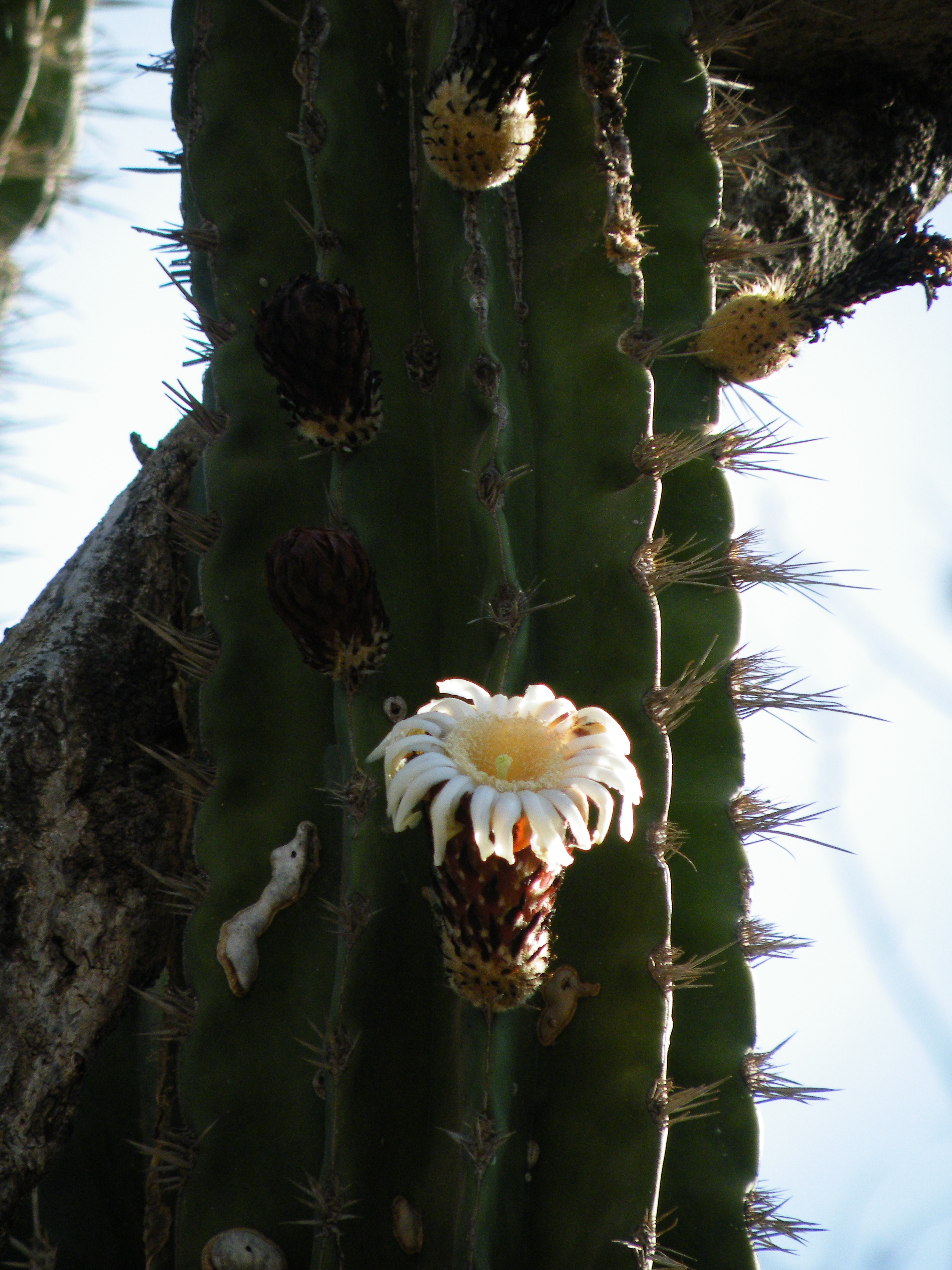 Guaymuchil, Sinaloa